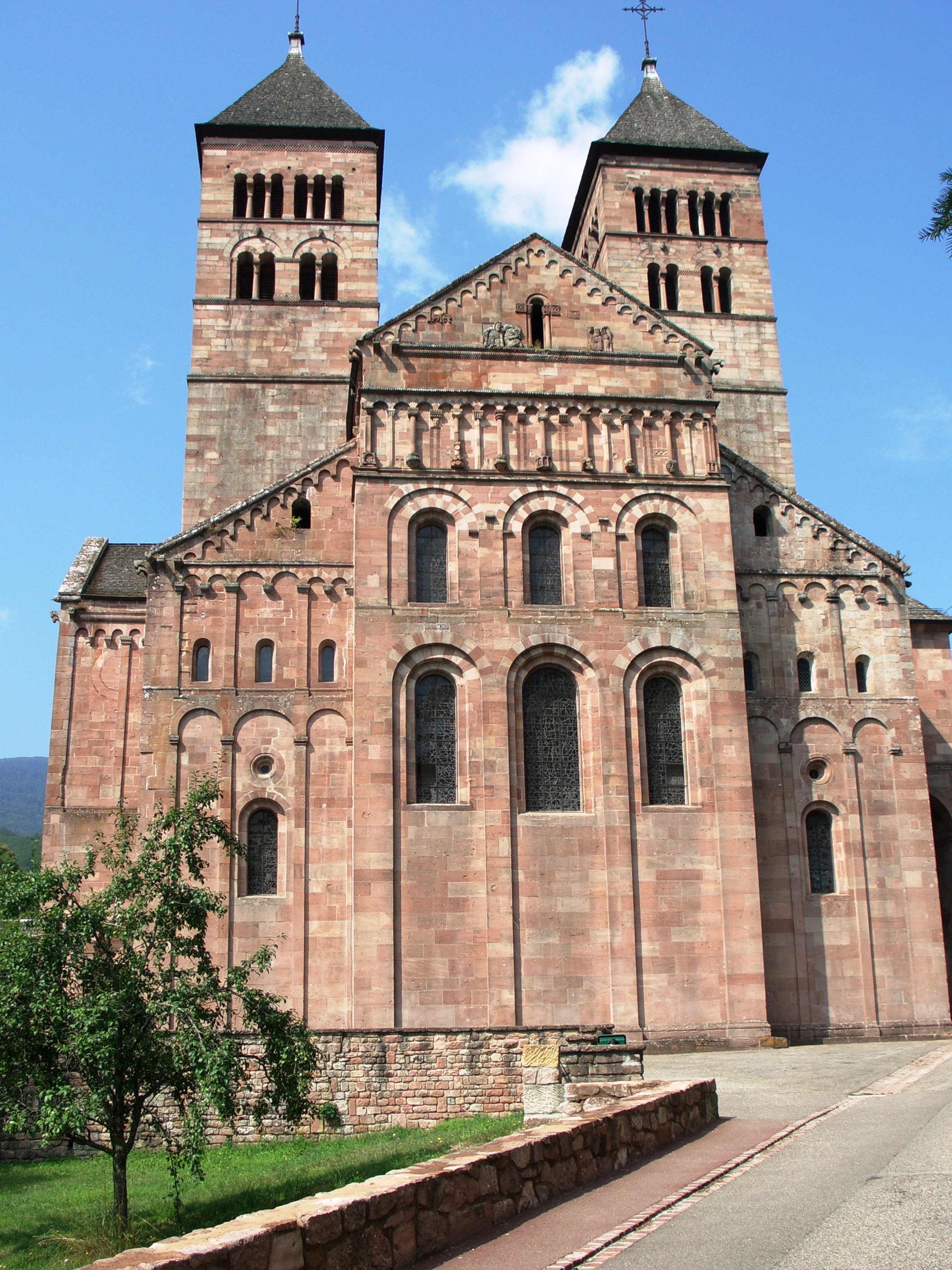 Abadia de Murbach